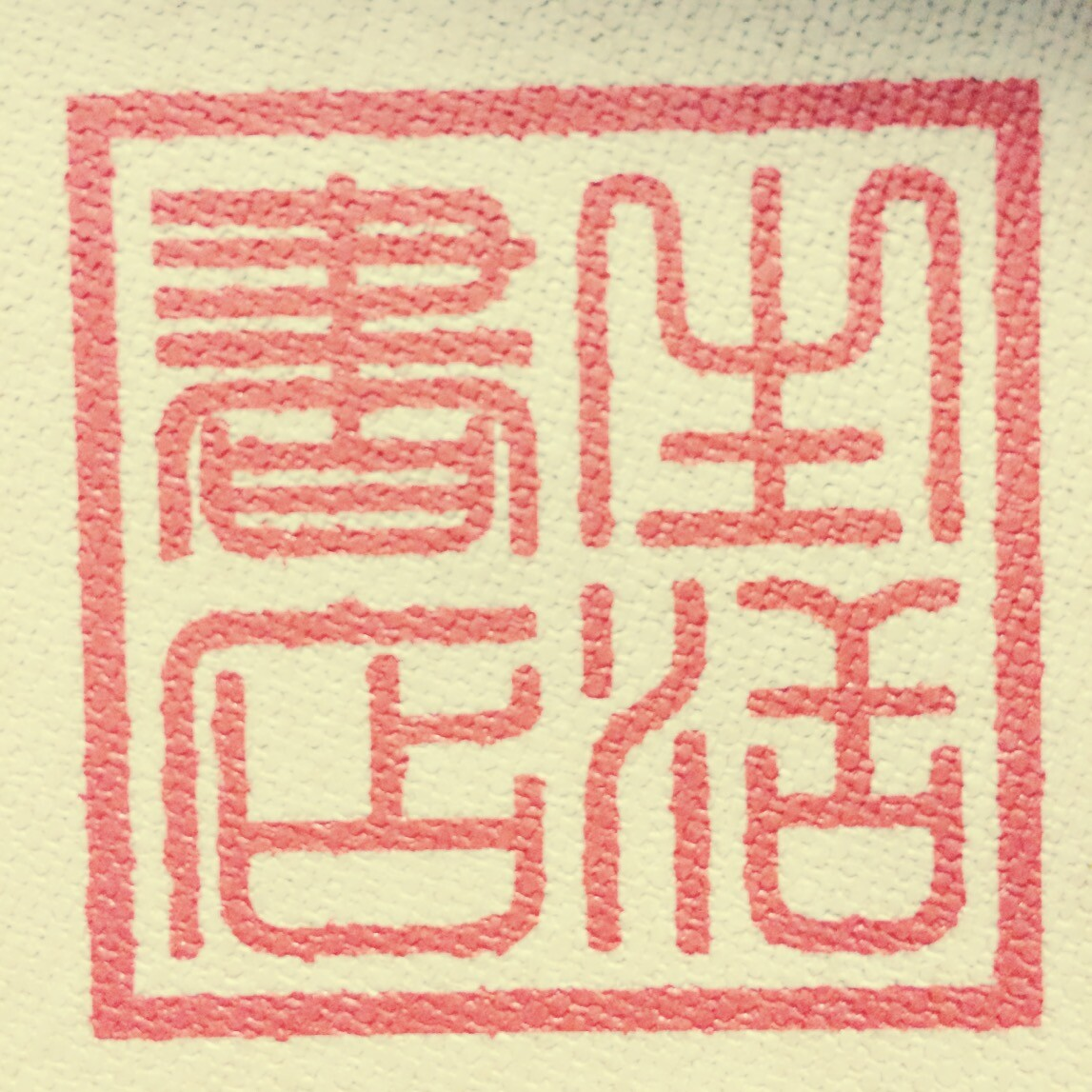 生活书店印章